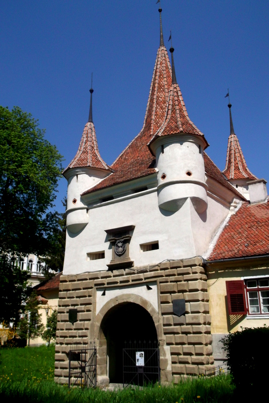 Rumunia, Braszów